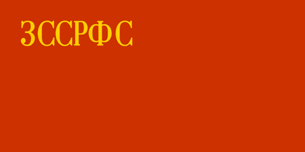 Zaqafqaziya Sovet Sosialist Respublikaları Federativ İttifaqının bayrağı (mart-dekabr 1922)